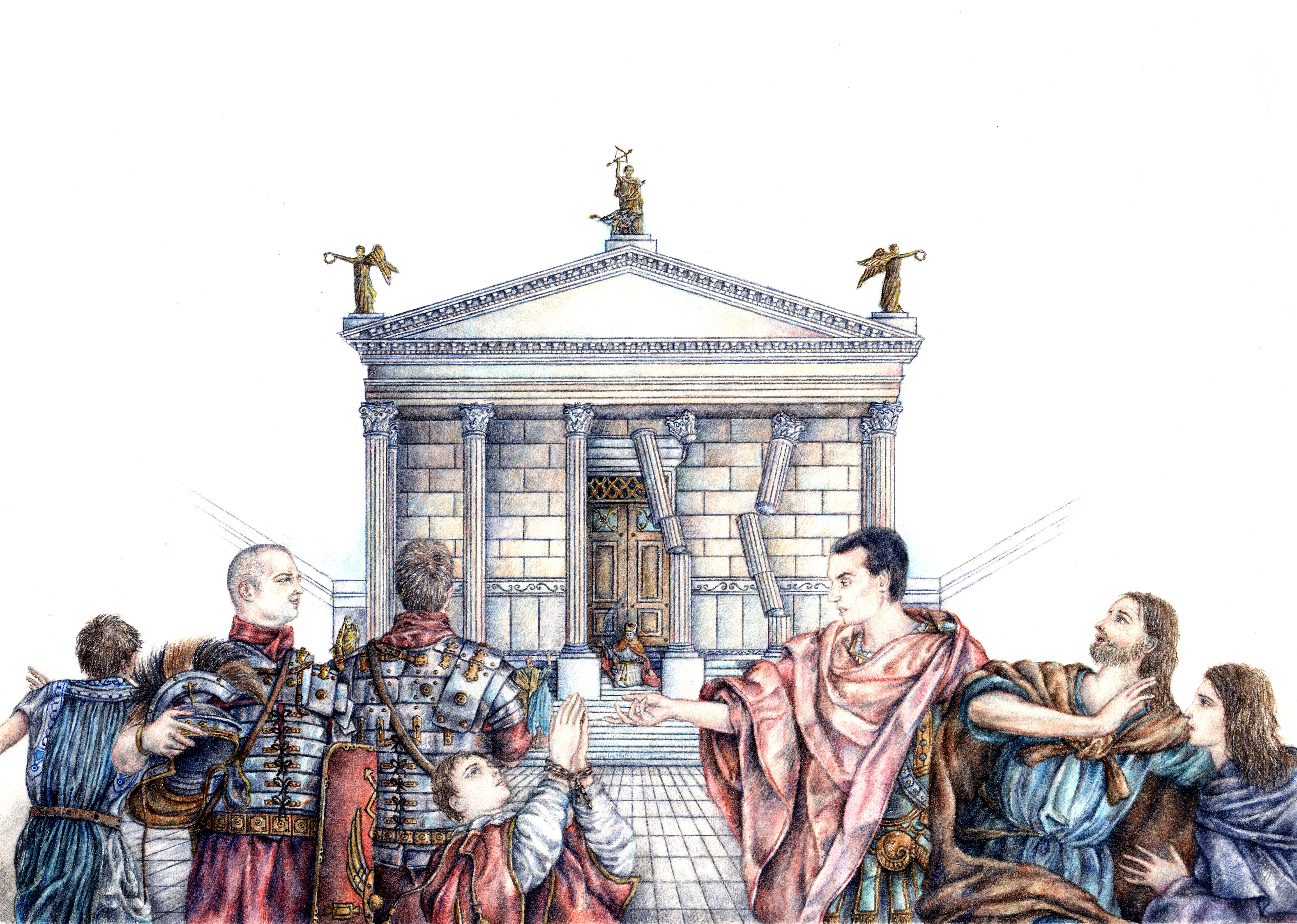 Condotto al tribunale del console Leonzio, il diacono Cesario è obbligato a sacrificare ad Apollo, ma, mentre viene condotto al tempio, questo crolla travolgendo il falso pontefice Firmino. Sullo sfondo vi è una ricostruzione del Tempio Maggiore di Terracina. La Cattedrale di Terracina - dedicata al diacono Cesario il 24 novembre 1074 - è stata costruita inglobando le strutture del Tempio Maggiore della città romana, posto sul lato nord-ovest del Foro Emiliano.